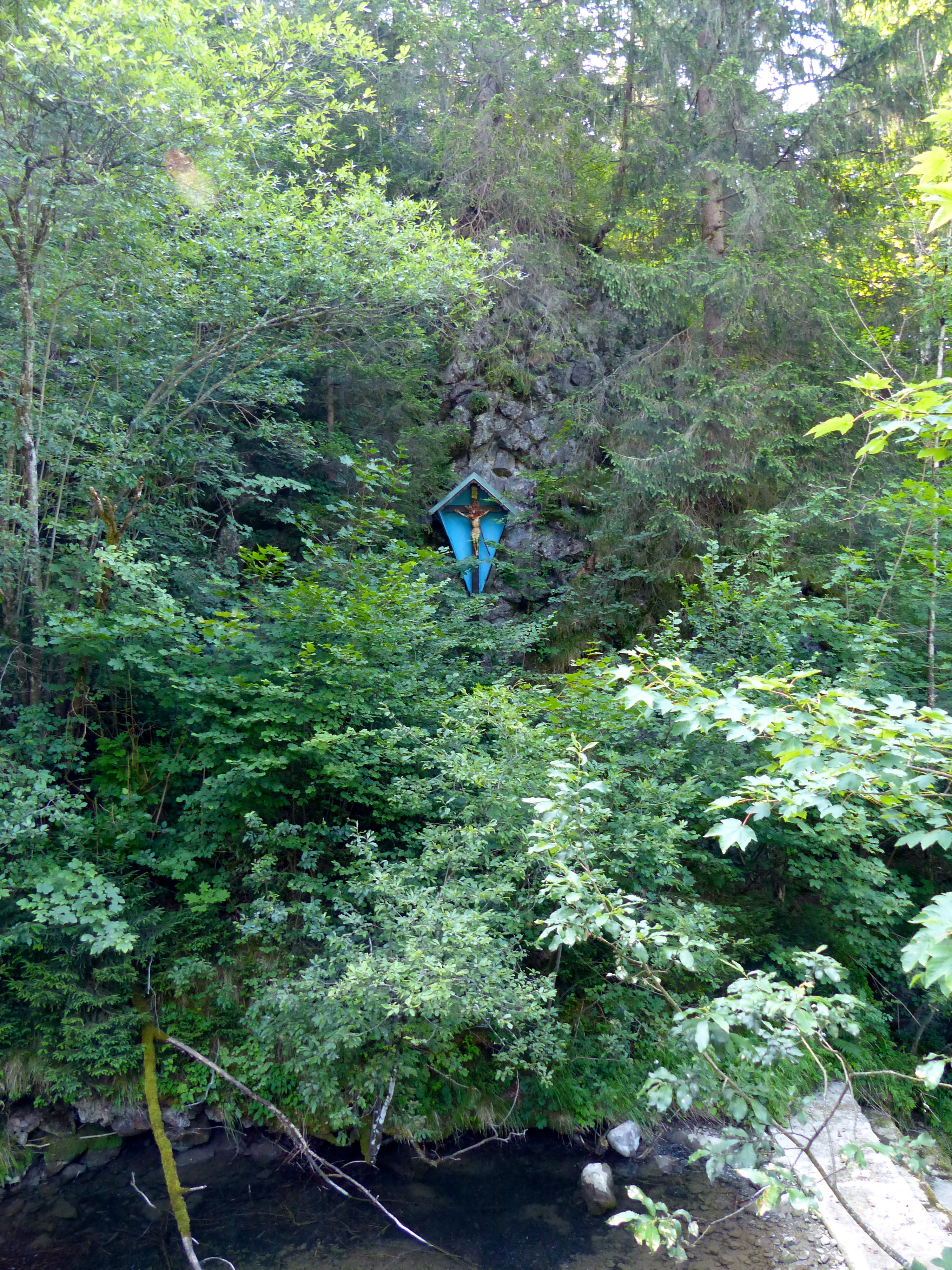 WikiProjekt Landstreicher Hindelang - Diabasaufschluss